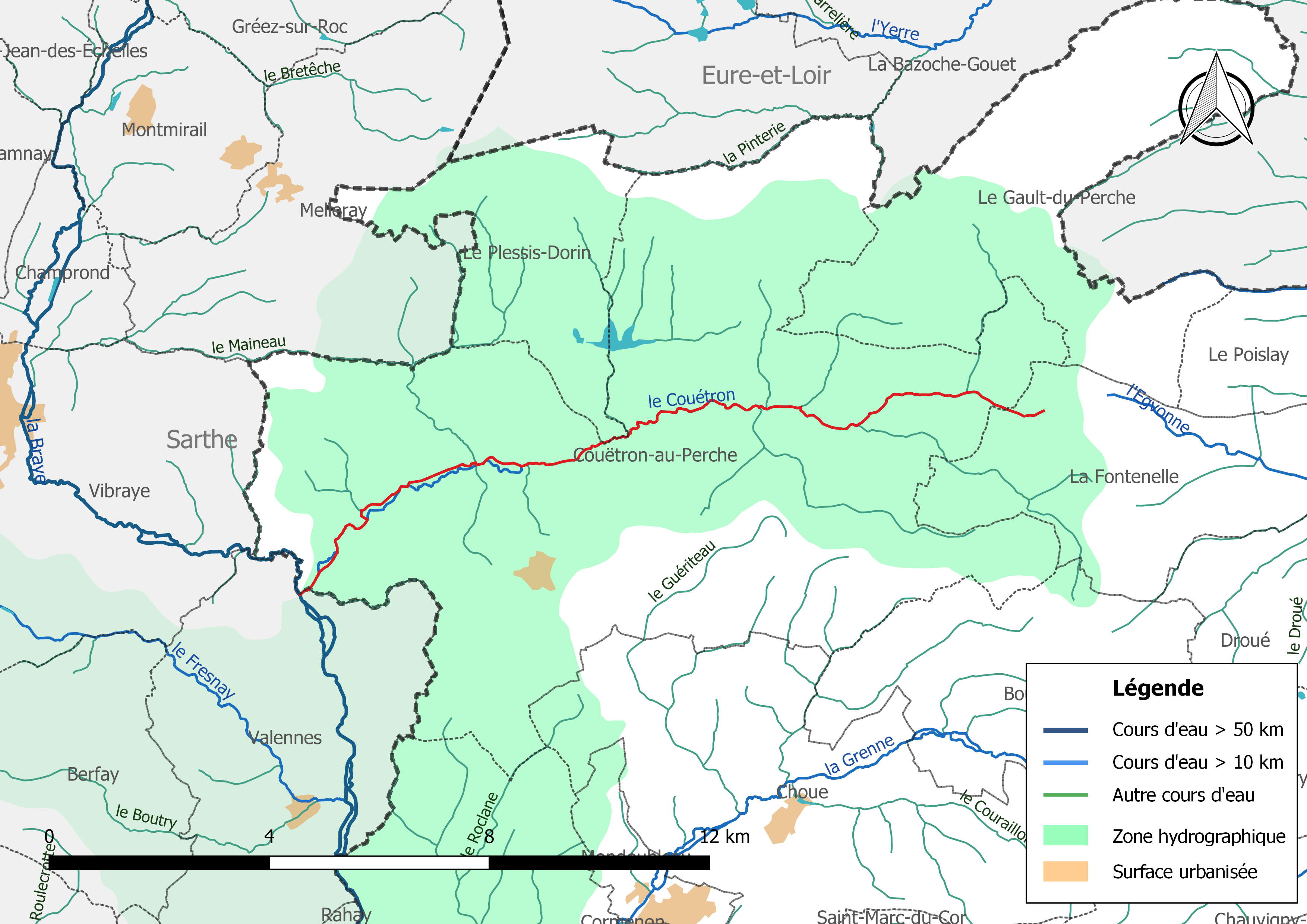 Carte du cours d'eau « le Couétron » et de son bassin versant (zone hydrographique dans laquelle il s'insère).